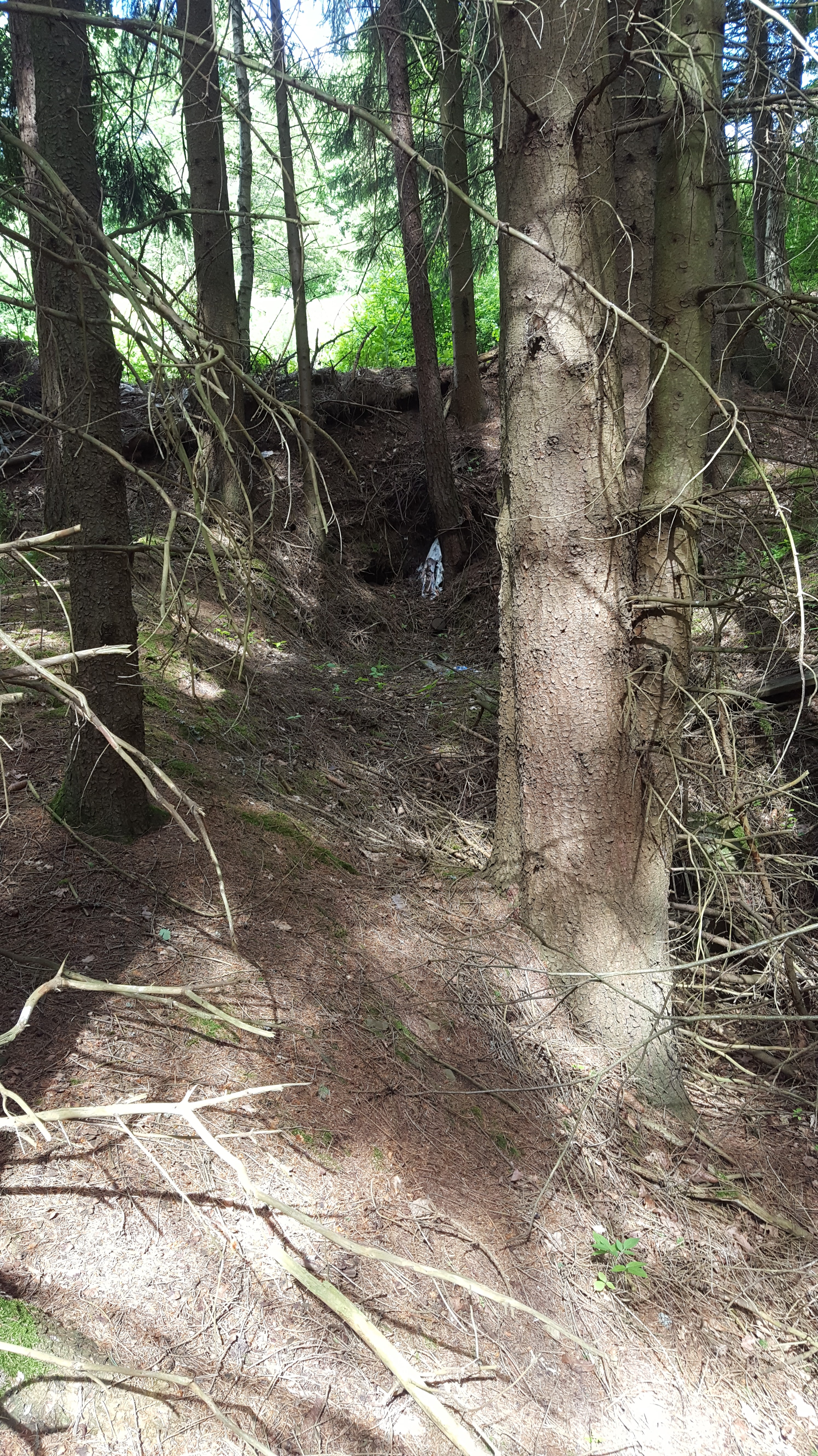 Mögliches verfallenes Stollenmundloch der Grube Aurora bei Niederroßbach/Hessen